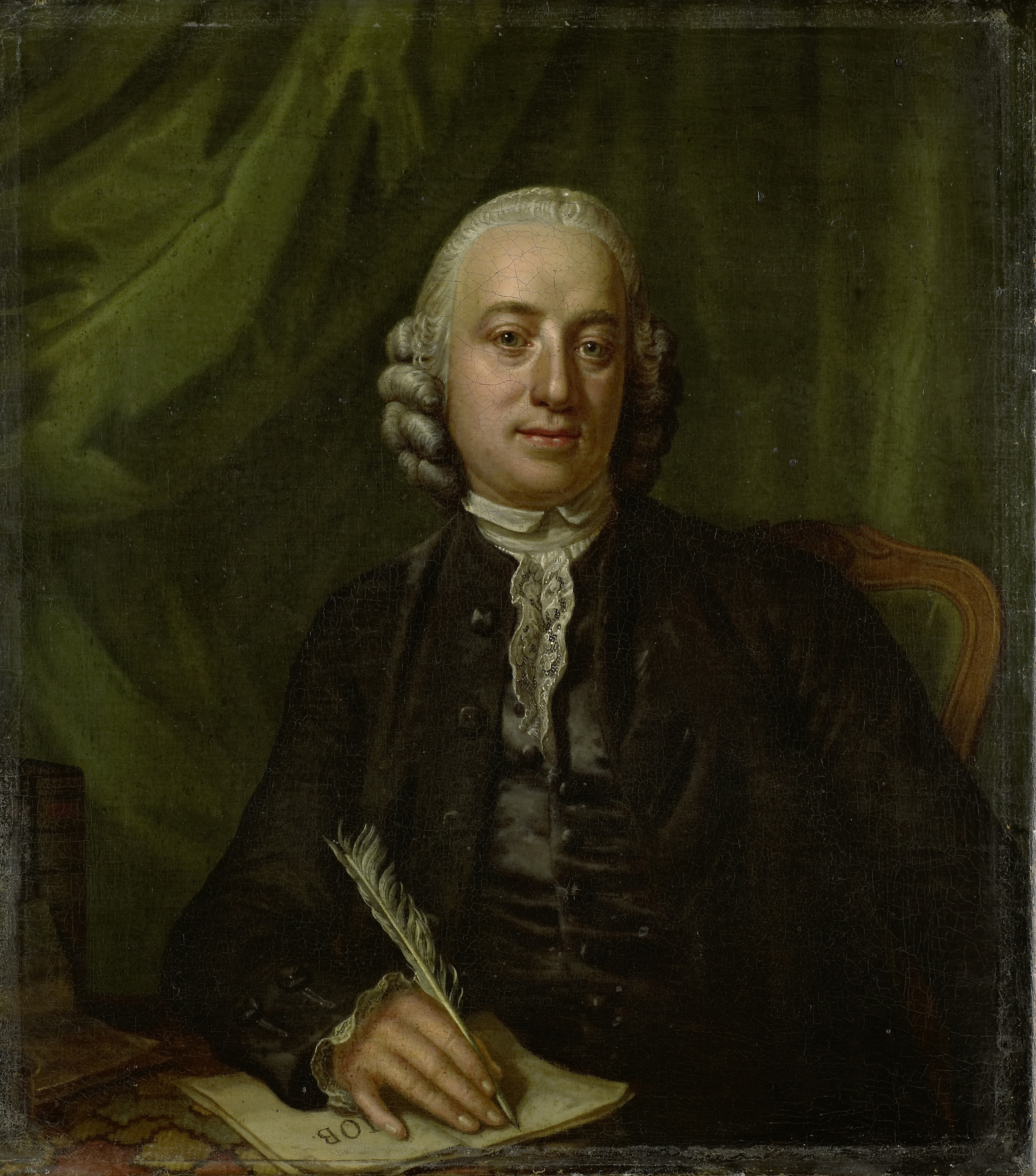 Portret van Pieter Meijer (1718-81), uitgever en boekverkoper te Amsterdam. Ten halven lijve, pen in de rechterhand, schrijvend aan een tafel waarop enkele boeken staan.